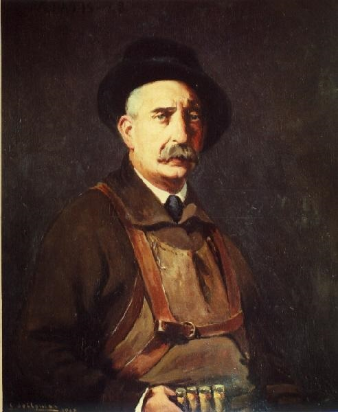 Autorretrato del pintor español Andrés Parladé y Heredia (1859-1933), conde de Aguiar y discípulo de José Moreno Carbonero.